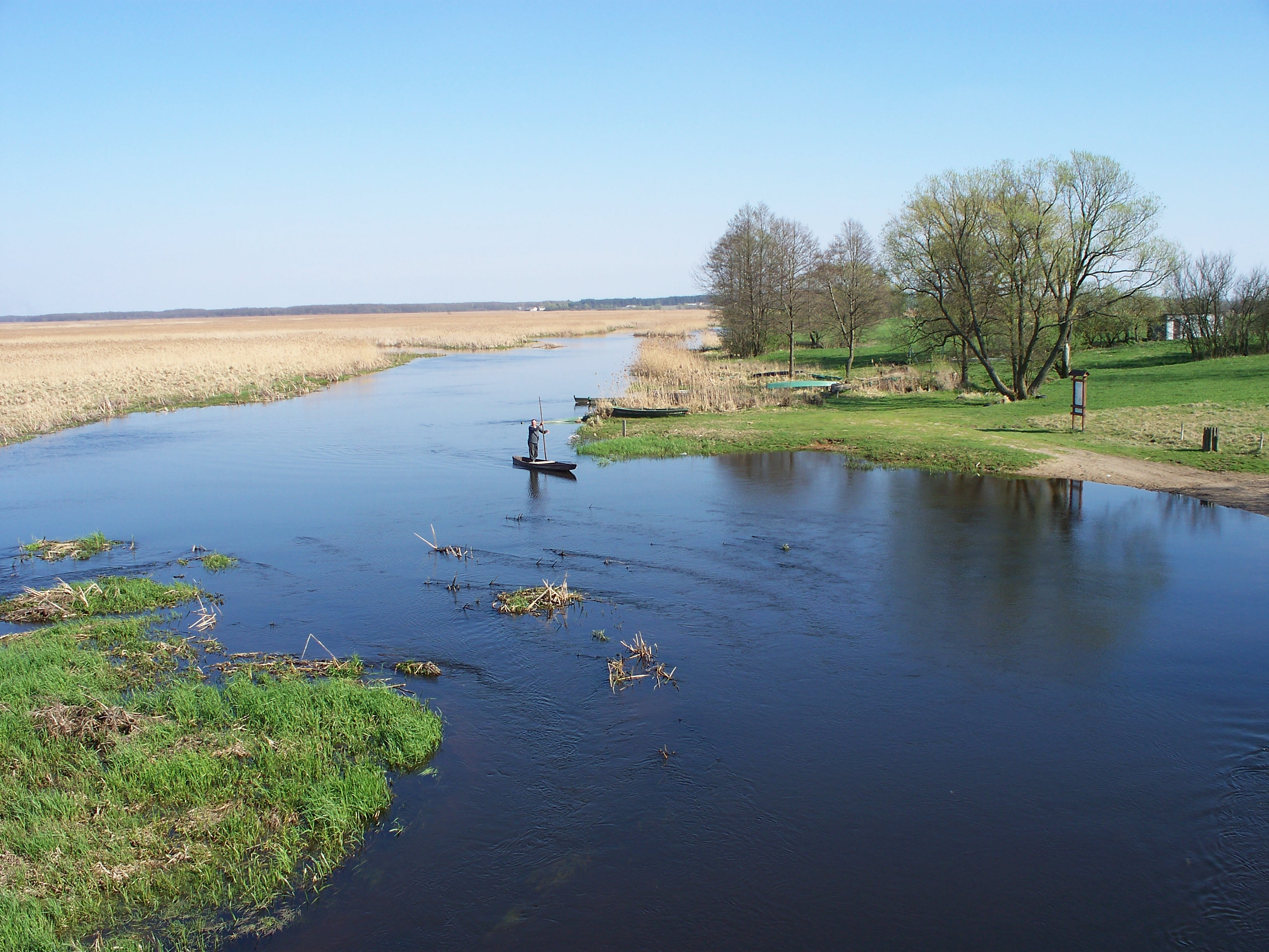 W oddali widoczna jest tradycyjna łódź pychówka. W Waniewie w lipcu jest organizowana impreza kulturalna: ,,Waniewo-Odpust- Natura” Podlaskie Muzyczne Spotkanie z Naturą ,,Franciszkiada”